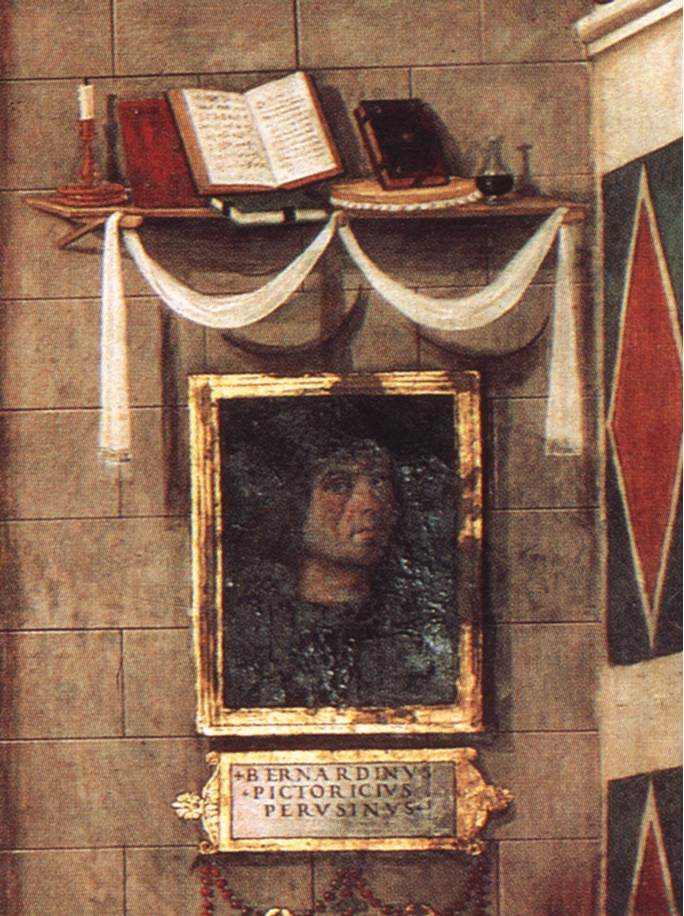 PINTURICCHIO Annunciation Fresco Cappella Baglioni, Collegiata di Santa Maria Maggiore, Spello